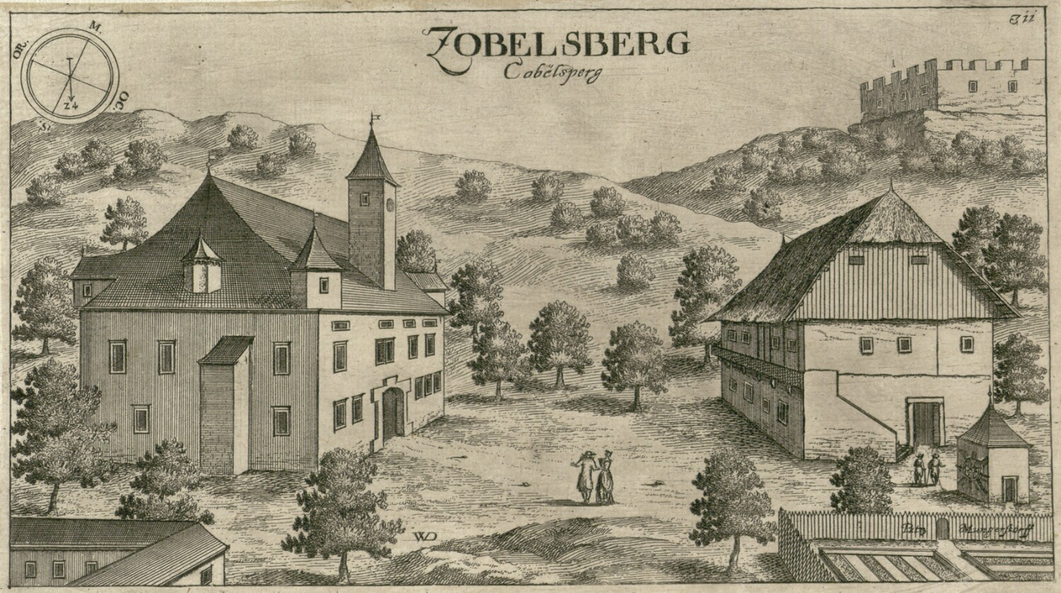 Čušperk